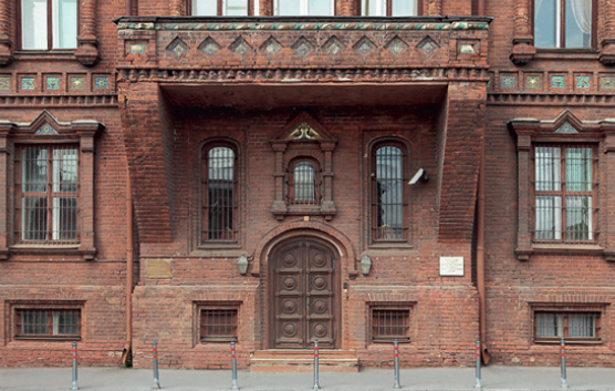 Подъезд особняка Цветкова до реставрации